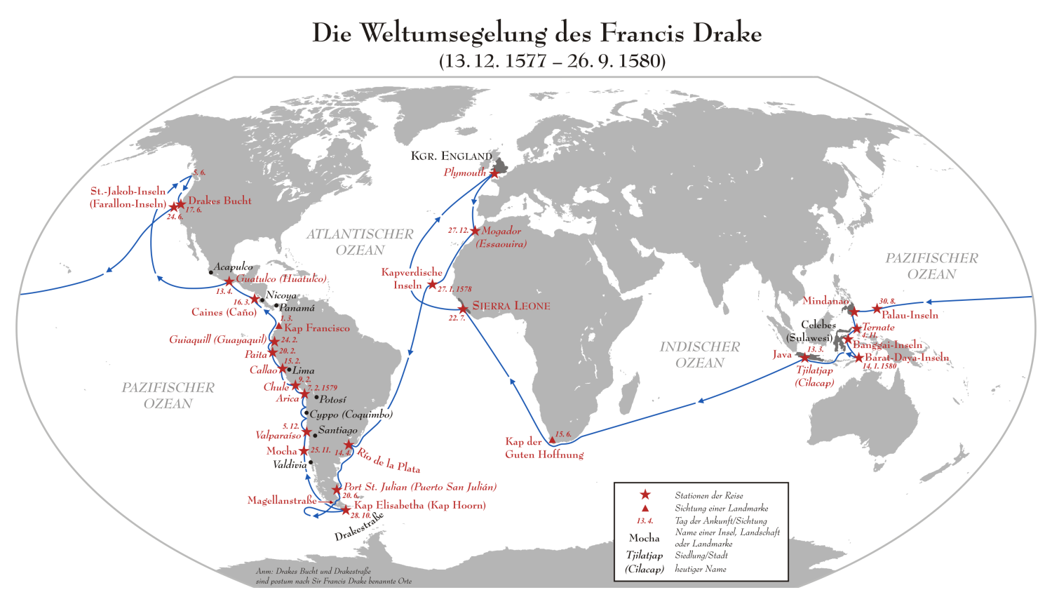 Bildbeschreibung: Die Weltumsegelung des Francis Drake V2.12 Datum: 21. Dezember 2006 Zeichner: Lencer Genutztes Programm: CorelDraw X3 (13) Vorlage Hintergrund: World map blank gmt Routenvorlage aus: National Geographic (Deutsche Ausgabe, Oktober 2002) u. a. Quellen für alle Ortsnamen/Stationen der Reise/Datumsangaben John Hampden (Hrsg.): Sir Francis Drake, Pirat im Dienst der Queen. Heine, 2001, ISBN 3-4531-8719-9 Francis Pretty: Sir Francis Drake's Famous Voyage Round The World. 1580 John Sugden: Sir Francis Drake. Touchstone-Book, Simon + Schuster, New York 1991, ISBN 0-671-75863-2 Anmerkung: Die Karte enthält alle im deutschen Wikipedia-Artikel "Weltumsegelung des Francis Drake" benannten Stationen der Reise, sowie weitere (in den Quellen/Tagebüchern) benannte Orte zur Orientierung, die Drake auf der Weltumsegelung aber nicht direkt angelaufen ist. Wenn irgendmöglich hab ich die Namen benutzt, die Francis Drake auf seiner Reise vergab, bzw. so wie sie in den Quellen/Tagebüchern benannt wurden (bspw. Kap Elisabetha statt Kap Hoorn, das erst 1616 seinen jetzigen Namen erhielt). Alle aktuellen Ortsnamen entsprechen (soweit in der Wiki mit eigenem Artikel vorhanden) der Schreibweise in der deutschen Wikipedia. Versionslog: V2.12 Namenskorrektur V2.11 Namenskorrektur, kleine Routenkorrektur V2.1 Erneute Änderung der Farbe Änderung der Legende und Überschrift Neues Symbol eingefügt Kleine Korrekturen V2.0 Neuer Hintergrund, Danke an San Jose Route an Kartengrundlage angepasst. Route und Stationen farbig Einige inhaltliche Ergänzungen Neue Lizenz V1.1 Grenzen entfernt Lizenz geändert